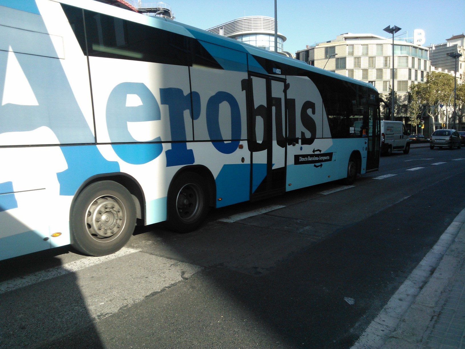 Aerobús a Pl. Espanya direcció Pl. Catalunya.